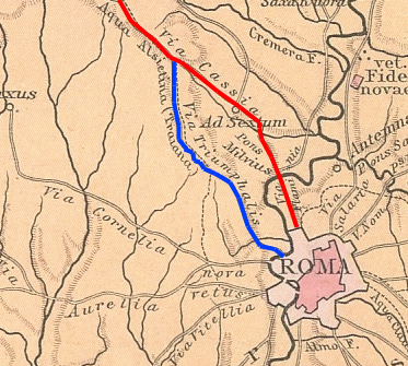 In blu la antica via Triofale. Il tracciato si estendeva da Roma alla via Cassia (tracciato in rosso